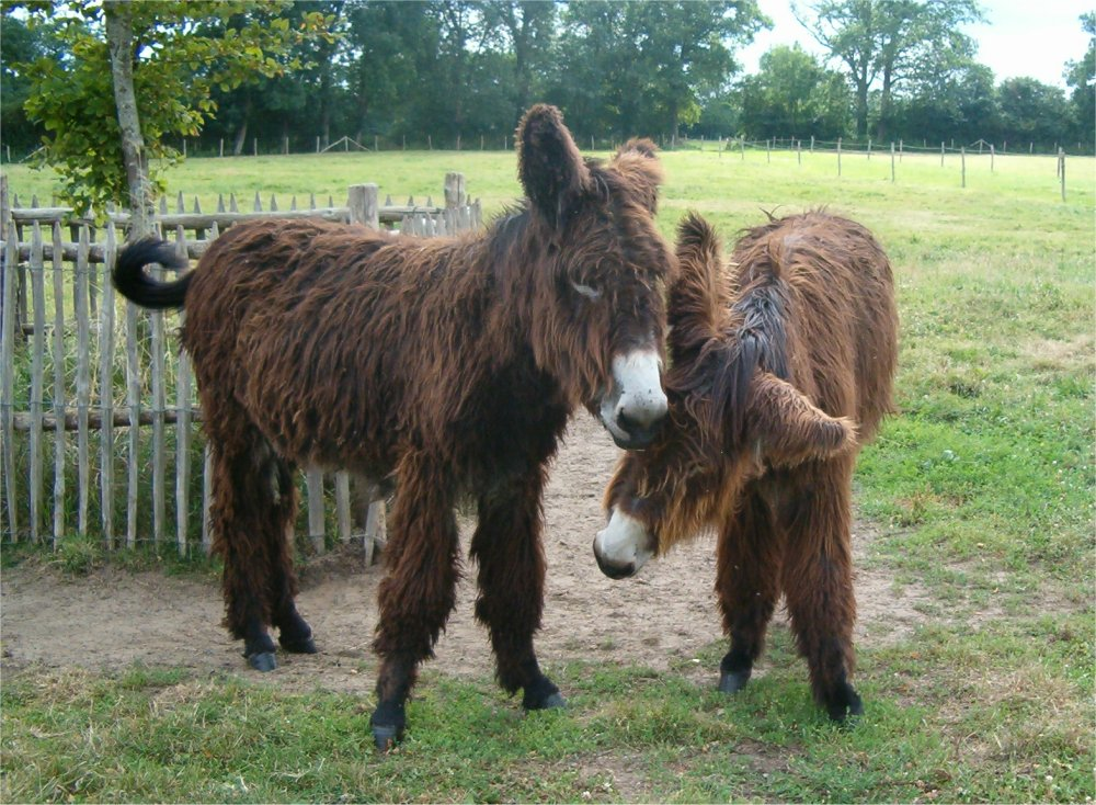 Baudets du poitou.